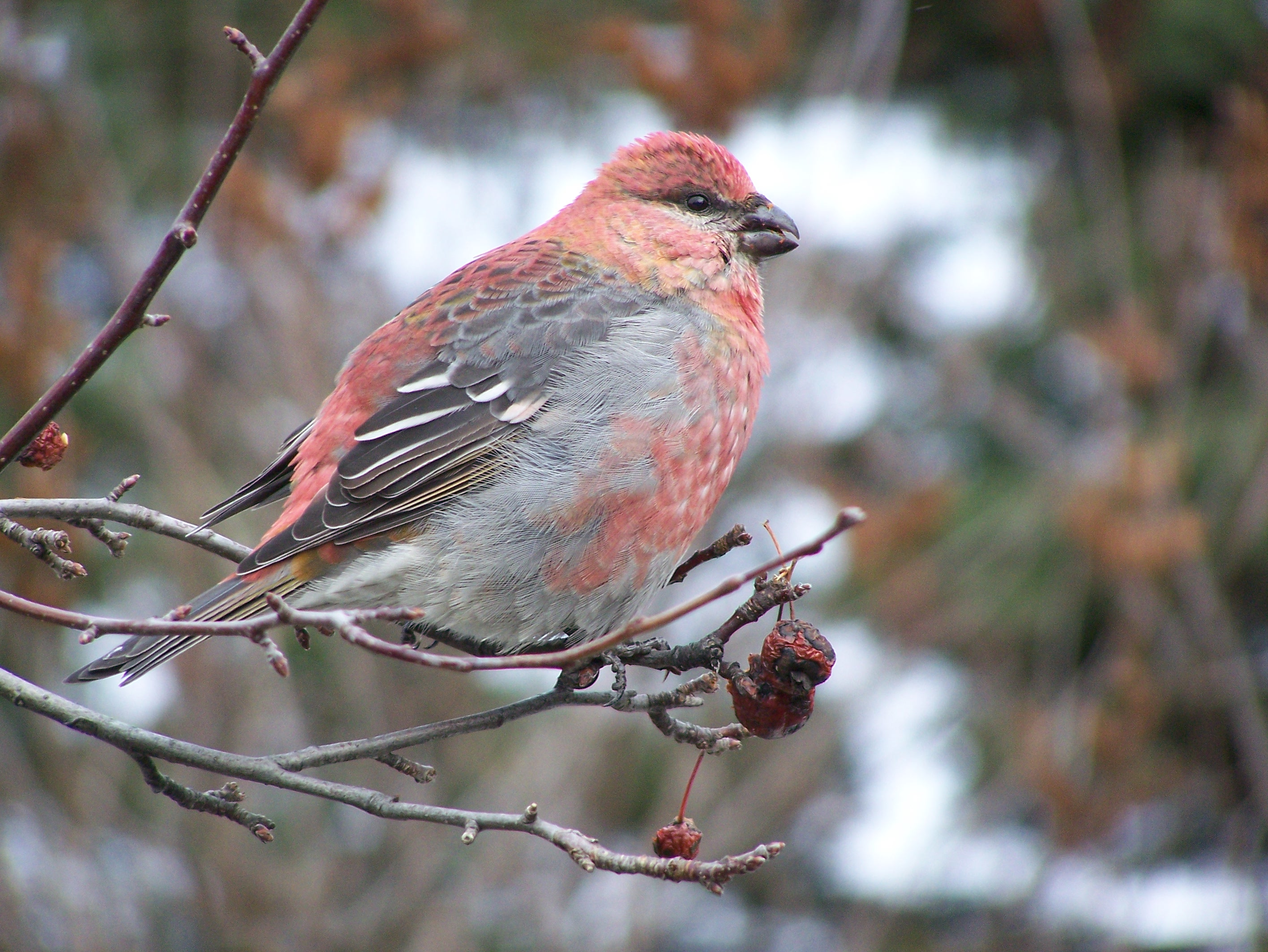 Pine Grosbeak (Pinicola enucleator)